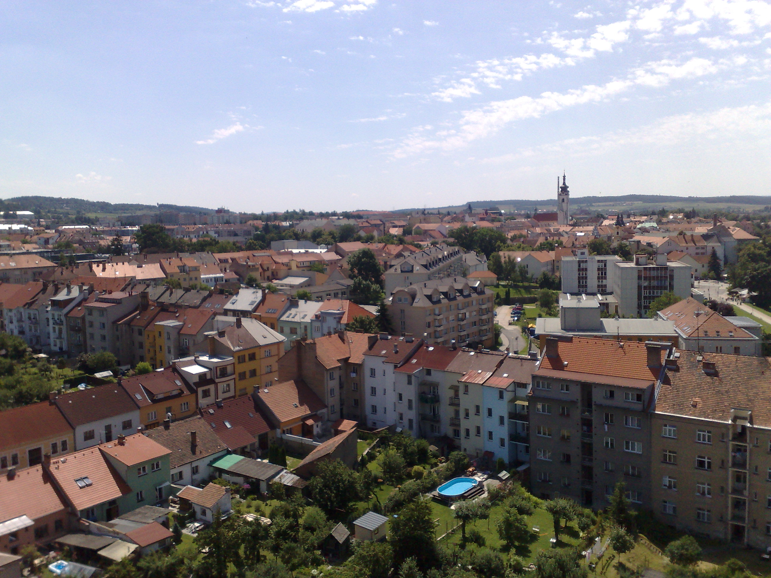 Pohled na město Písek - Starý most.